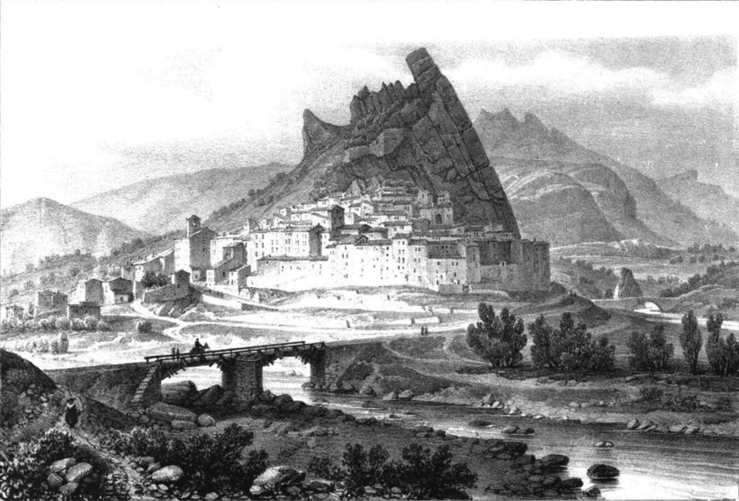 Album du Dauphiné - tome III, lithographie de Serres